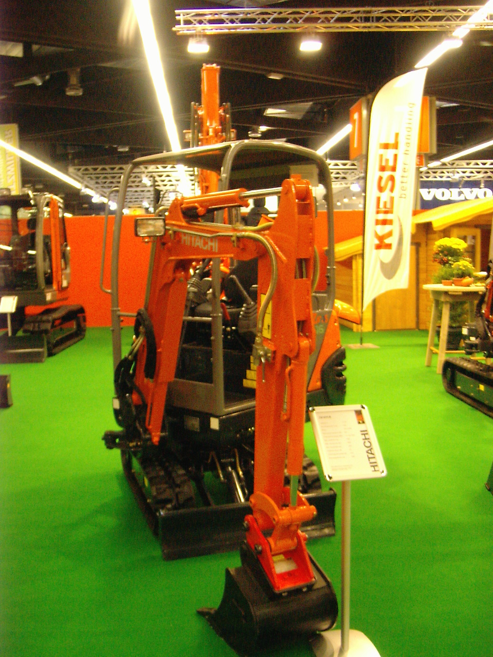 Hitachi graafkraantje op de GaLaBau in Nürnberg, 2006.